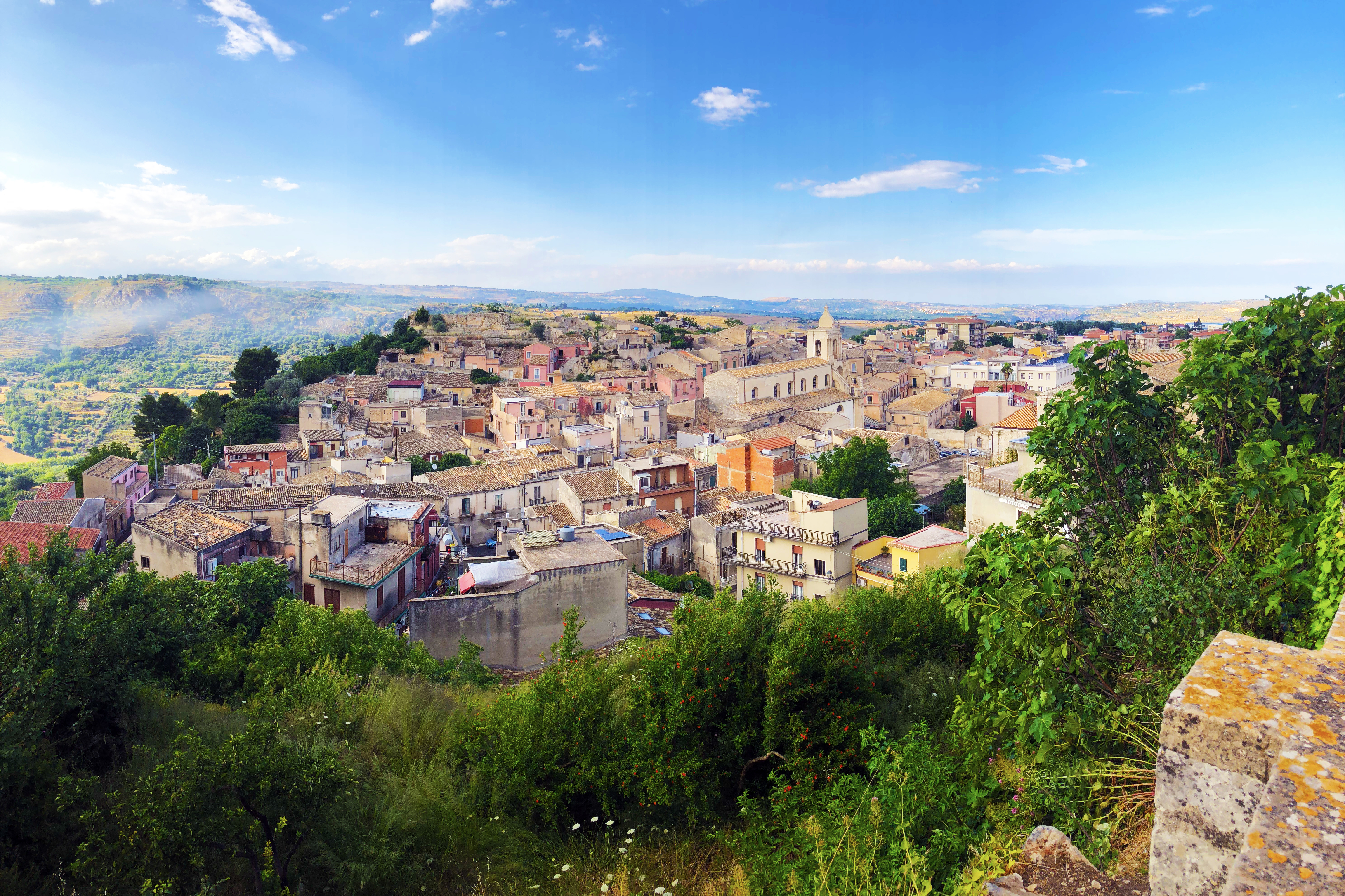 Scorcio di Palazzolo con il castello